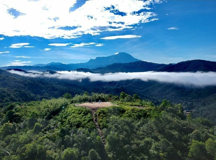 Pemandangan Bukit Perahu